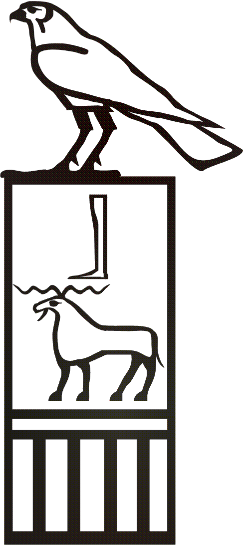 Horusname des Königs Ba (2. oder 3. Dynastie Ägyptens)